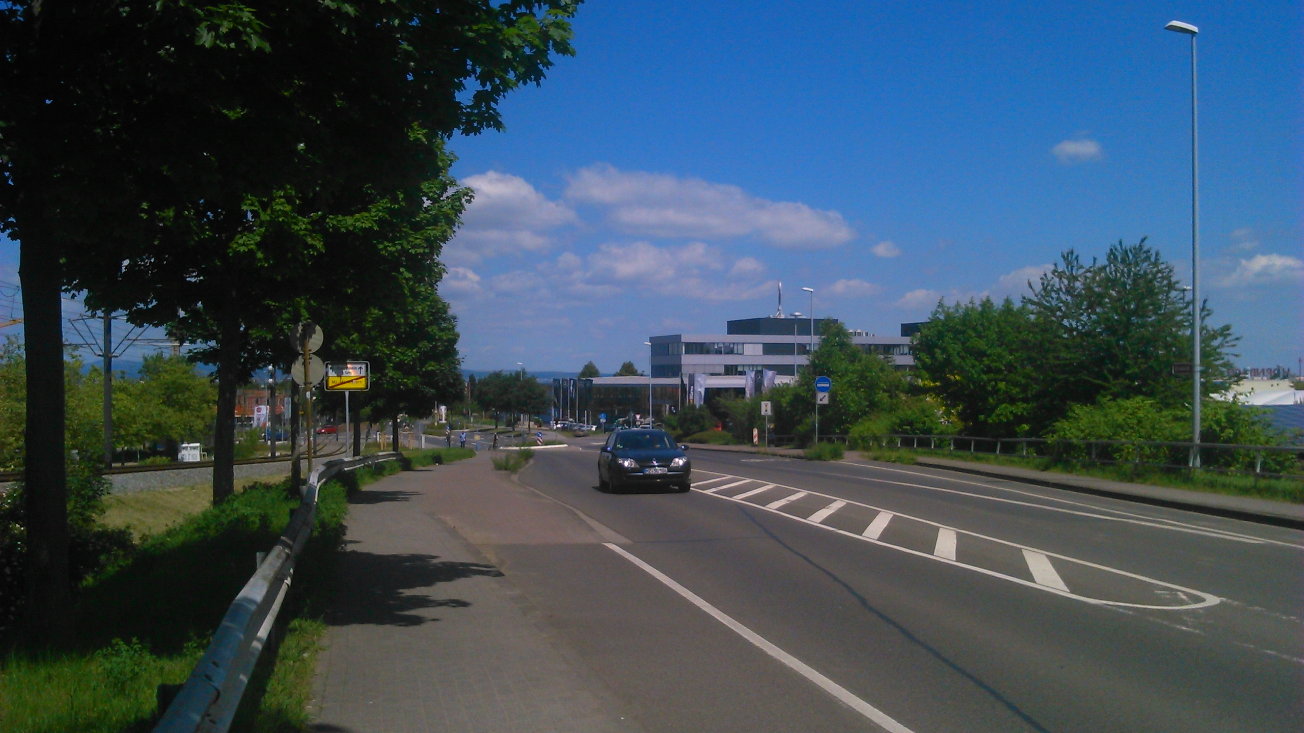 Einfahrt nach Mainz-Bretzenheim aus südlicher Richtung